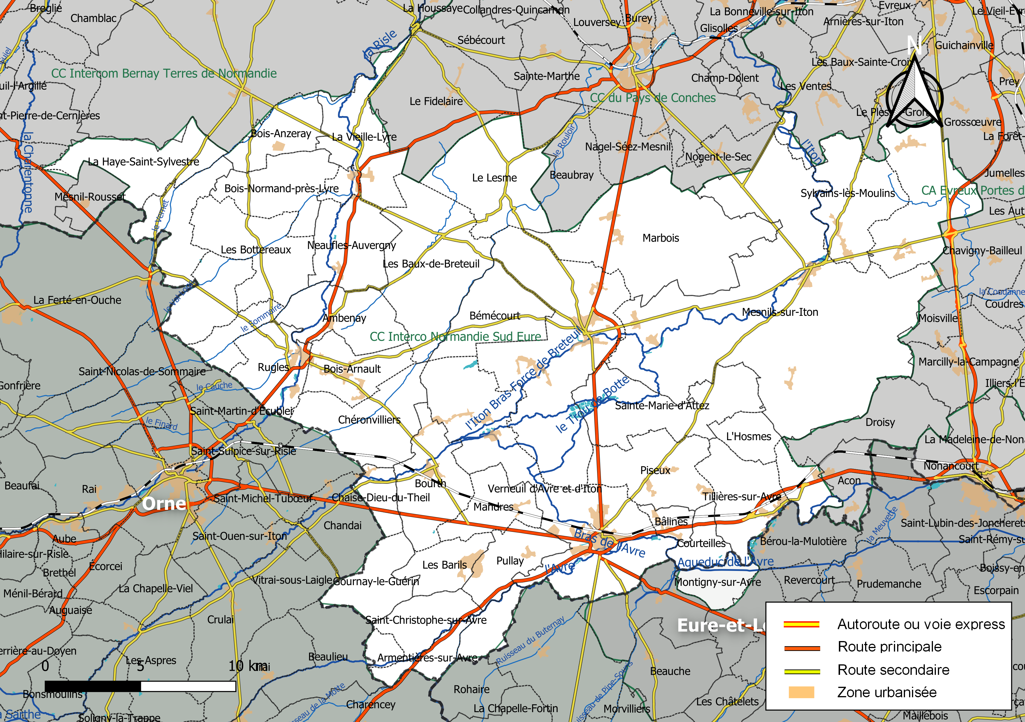 Carte géographique de la Communauté de communes Interco Normandie Sud Eure, département de l'Eure, France. Composition au 1er janvier 2019.